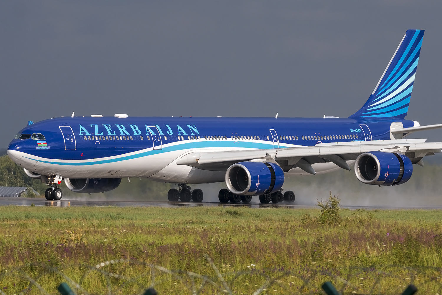 Airbus A-340-500